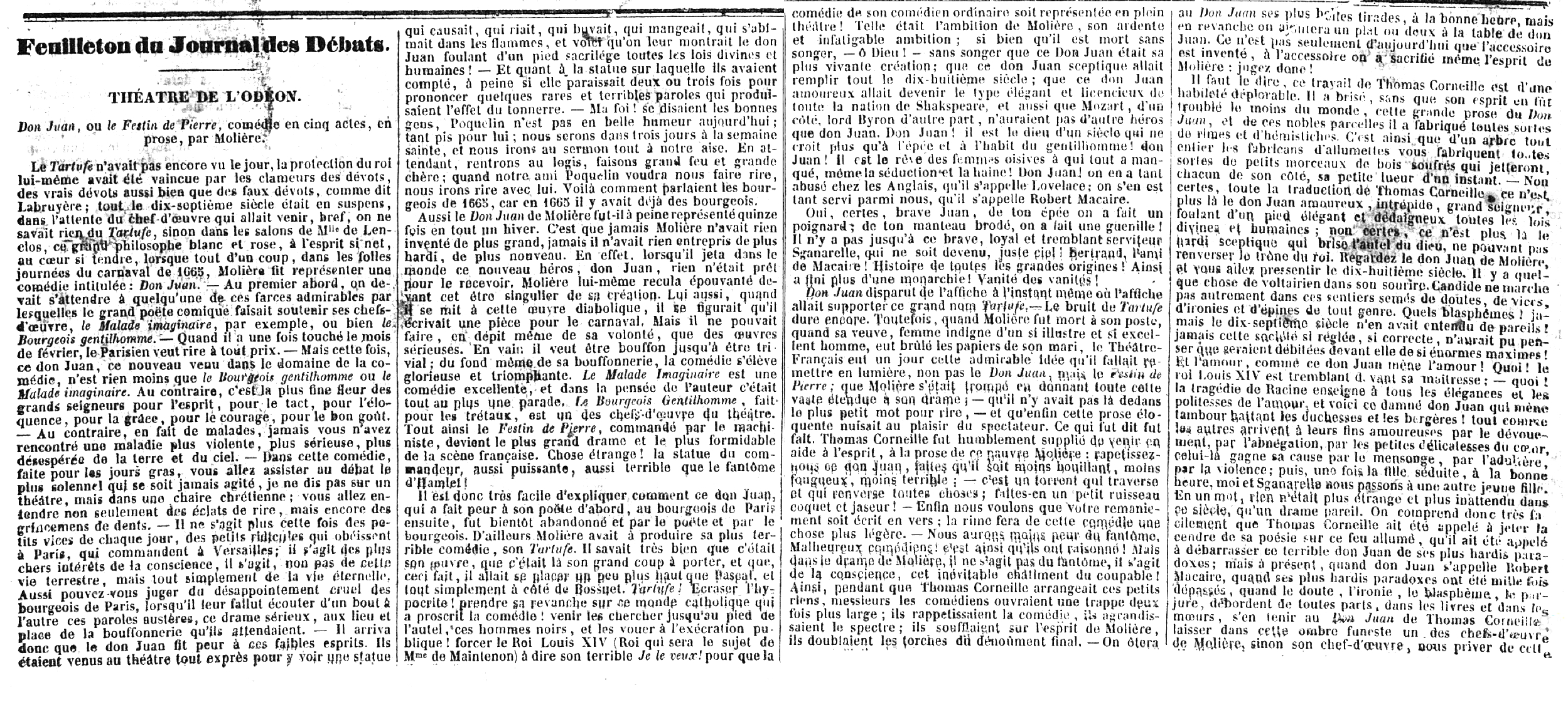 Jules Janin, À propos de la reprise de Dom Juan en 1841